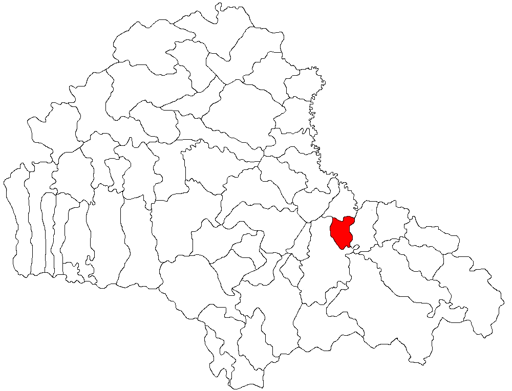 Categorie:Hărţi ale judeţului Braşov